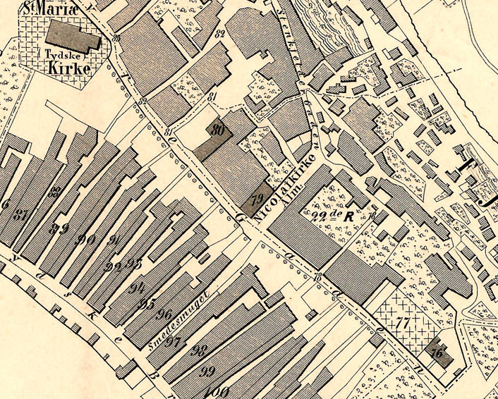 Kart over Bergen med Omegn.